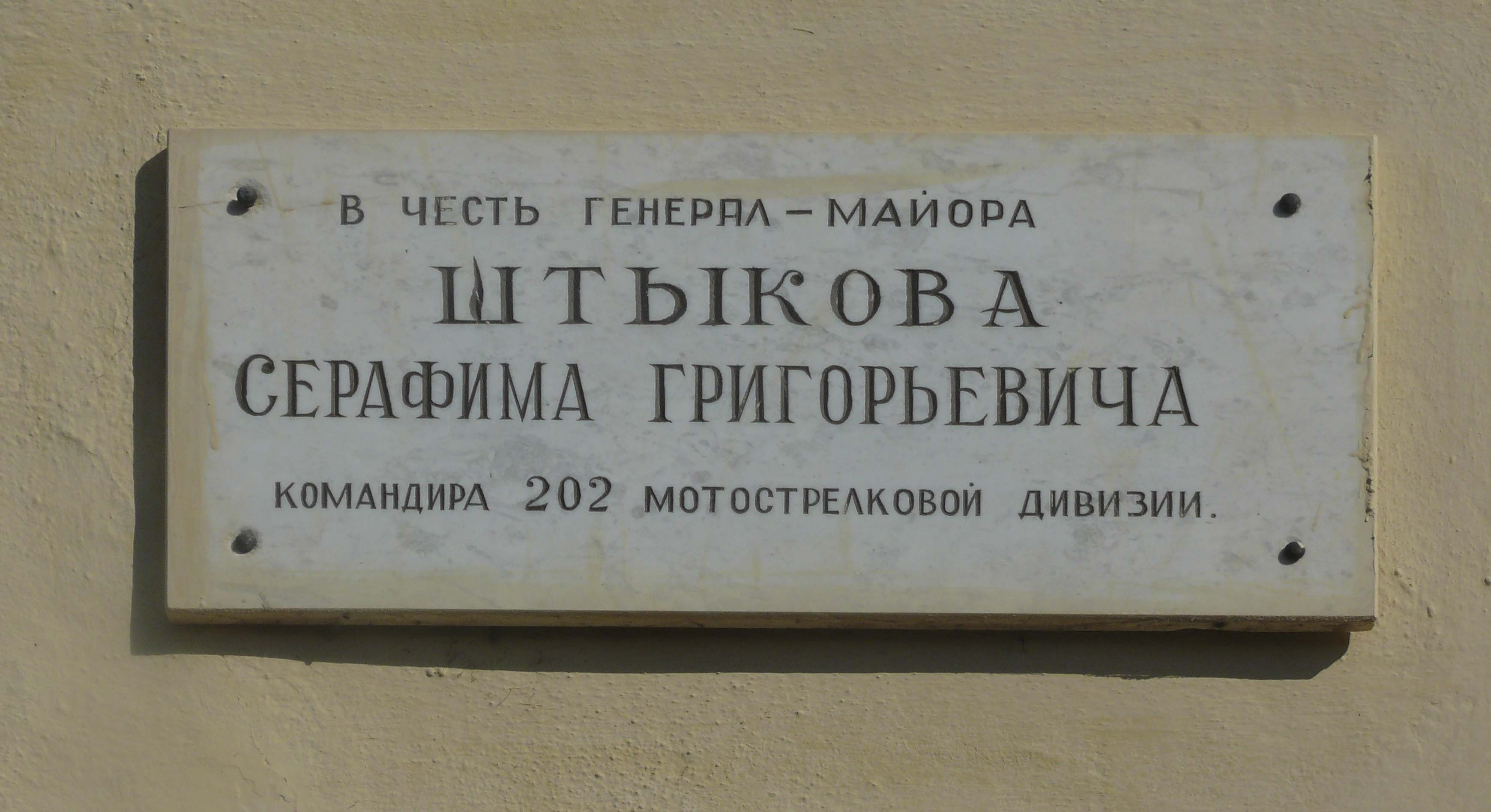 Памятная табличка на одном из домов в Старой Руссе, Новгородская область